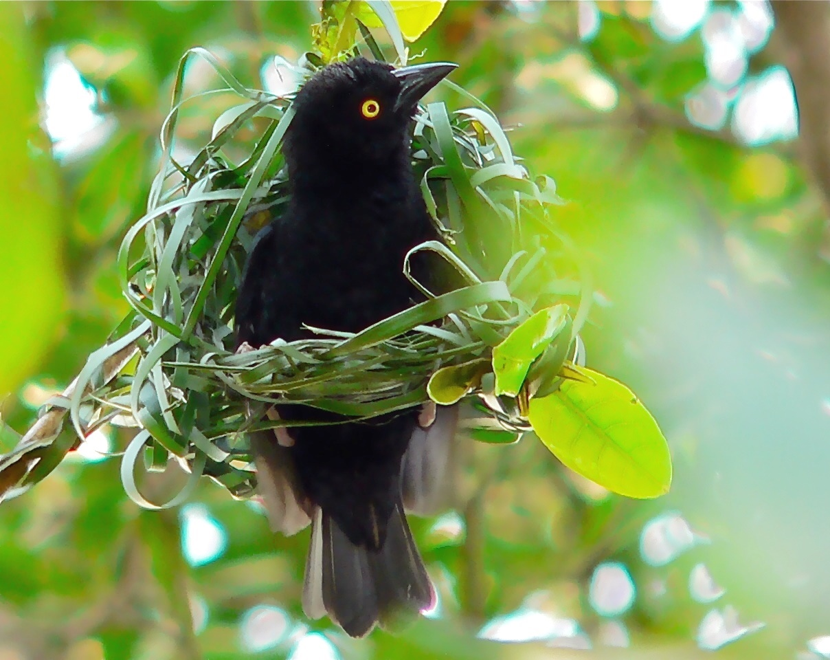 Limbe Botanic Garden, CAMEROON